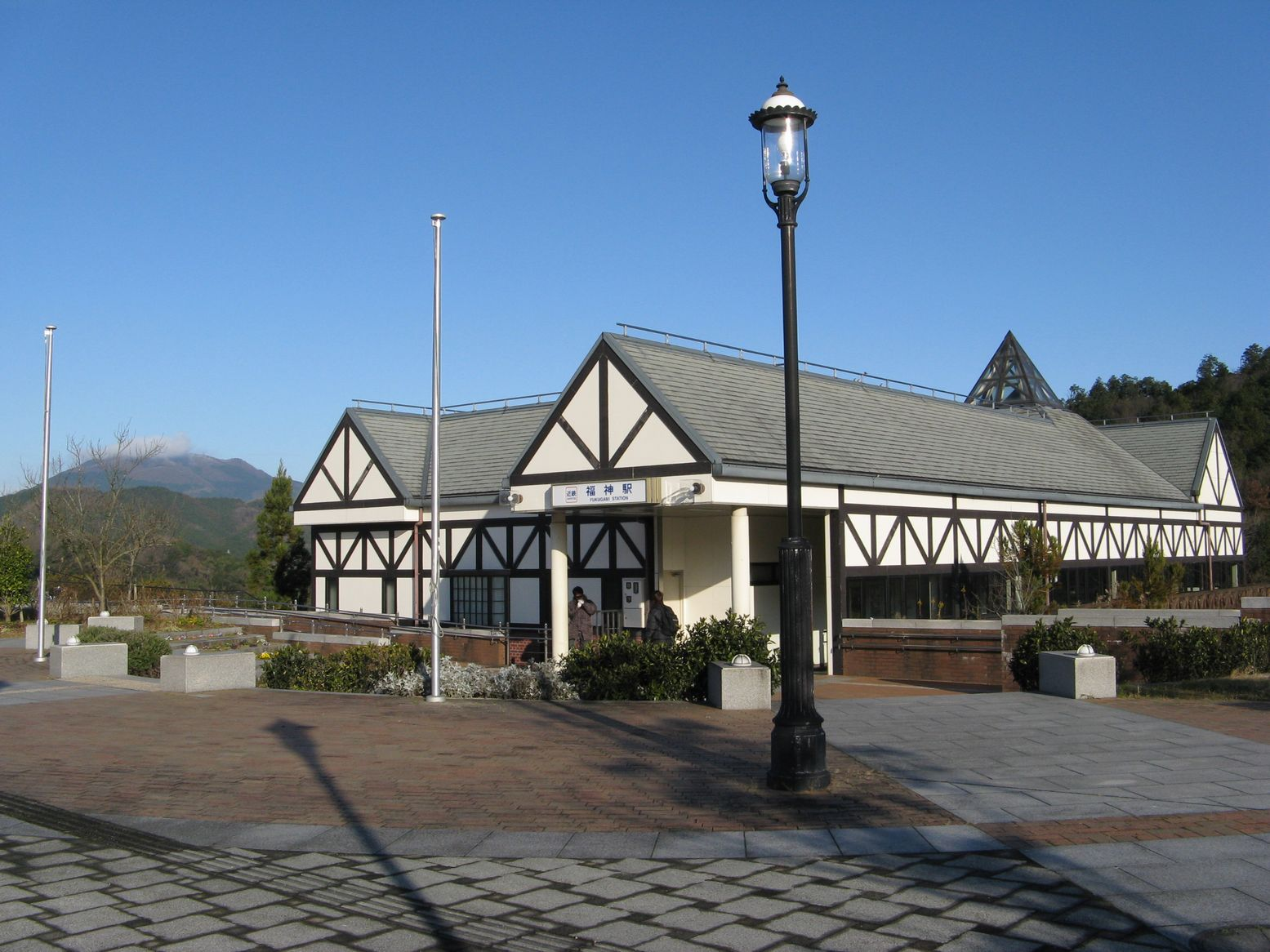 福神駅 駅舎